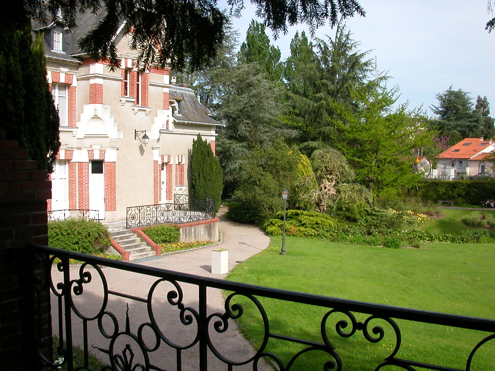 Manoir et parc de la Morinière à Rezé (Loire-Atlantique, France).